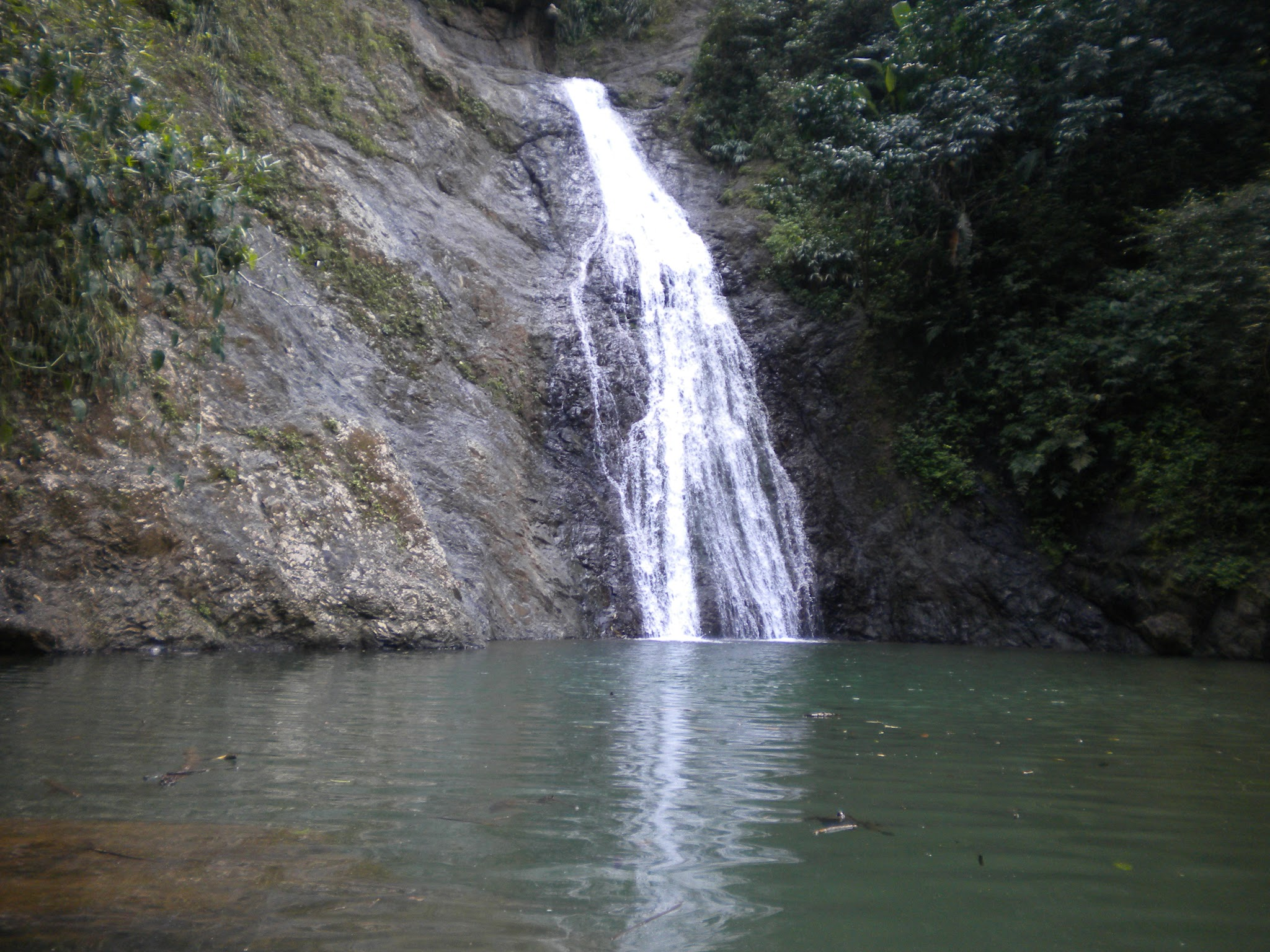 Indiera Fría, Maricao, Puerto Rico